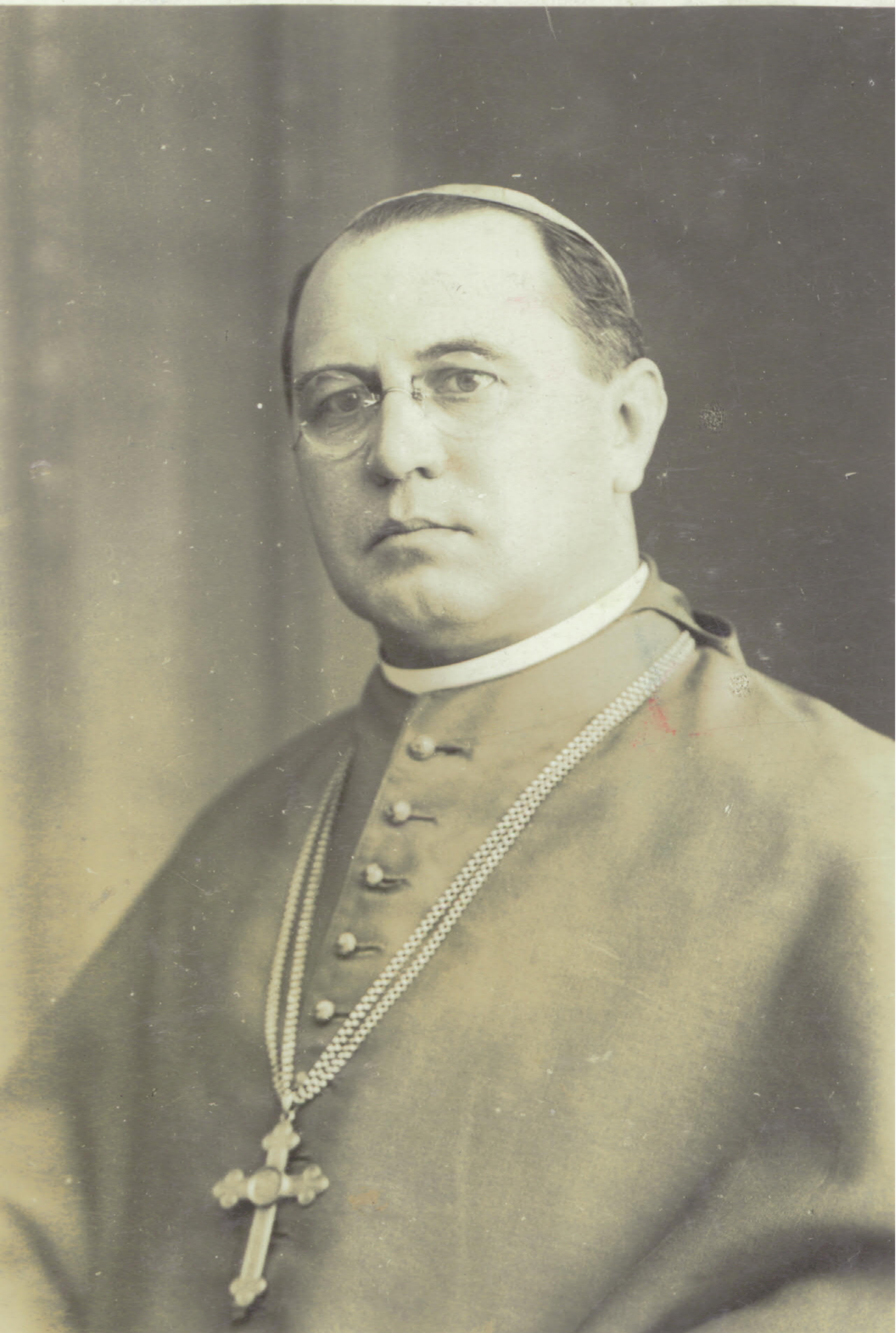 Foto-Anstalt J.Kuss, Mariazell